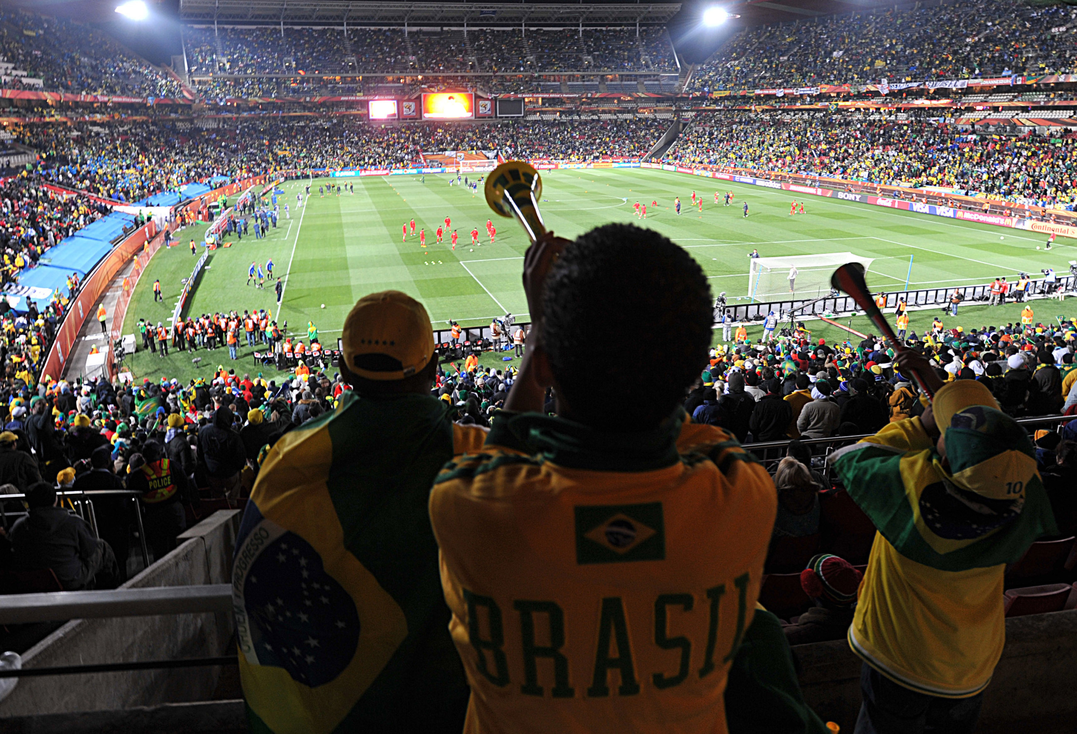 Torcida brasileira comanda a festa na estreia da seleção na Copa do Mundo da África do Sul.